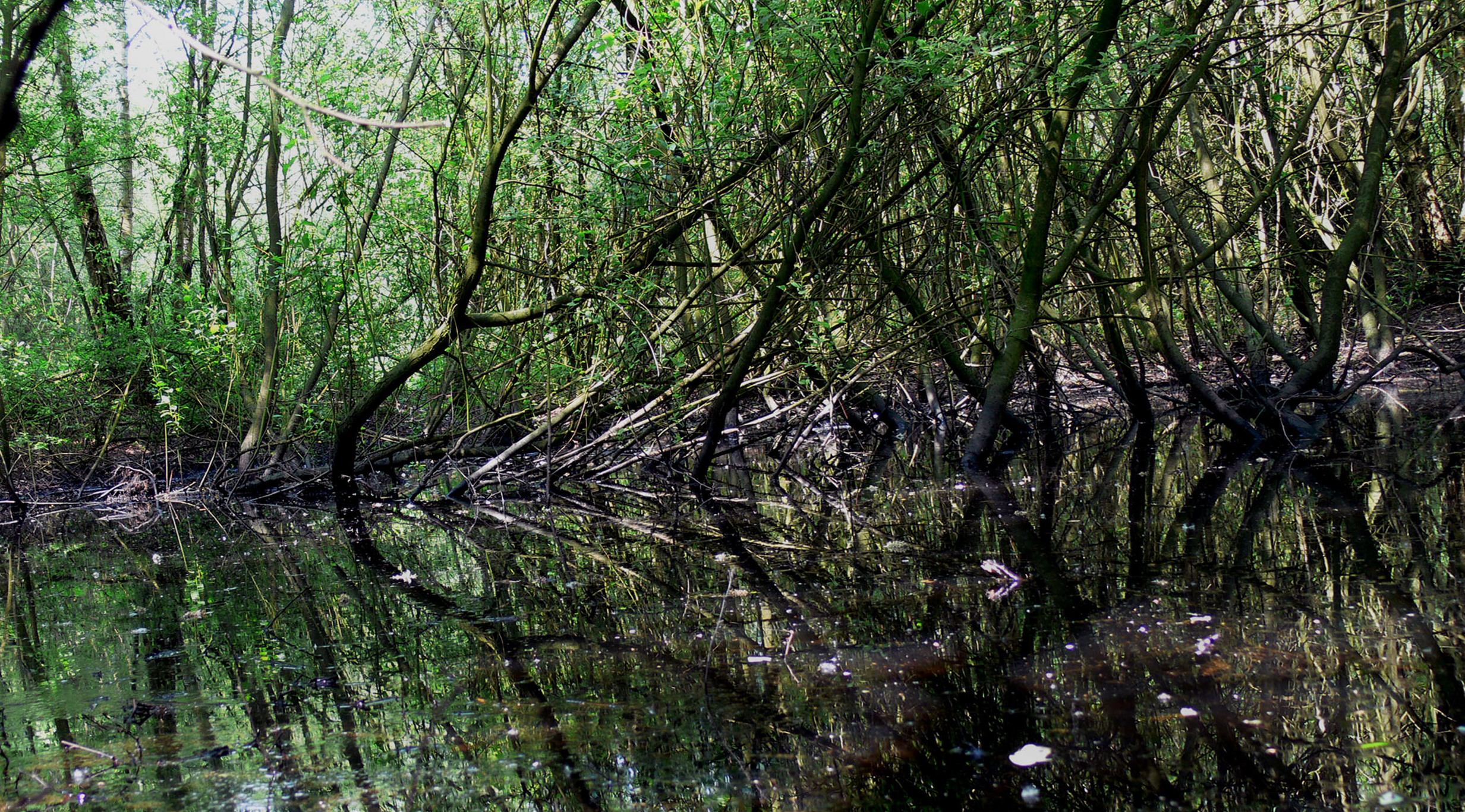 zone humide colonisée par le sous bois (non loin du site où ont été photogaphié les Marchantiophytas, réserve naturelle des Landes du Plateau d'Helfaut, en bordure de mare, sur ancienne zone de décantation de carrière de silex, Commune d'Heuringhem (ou de Blendecques ?), Nord-Pas-de-Calais, France